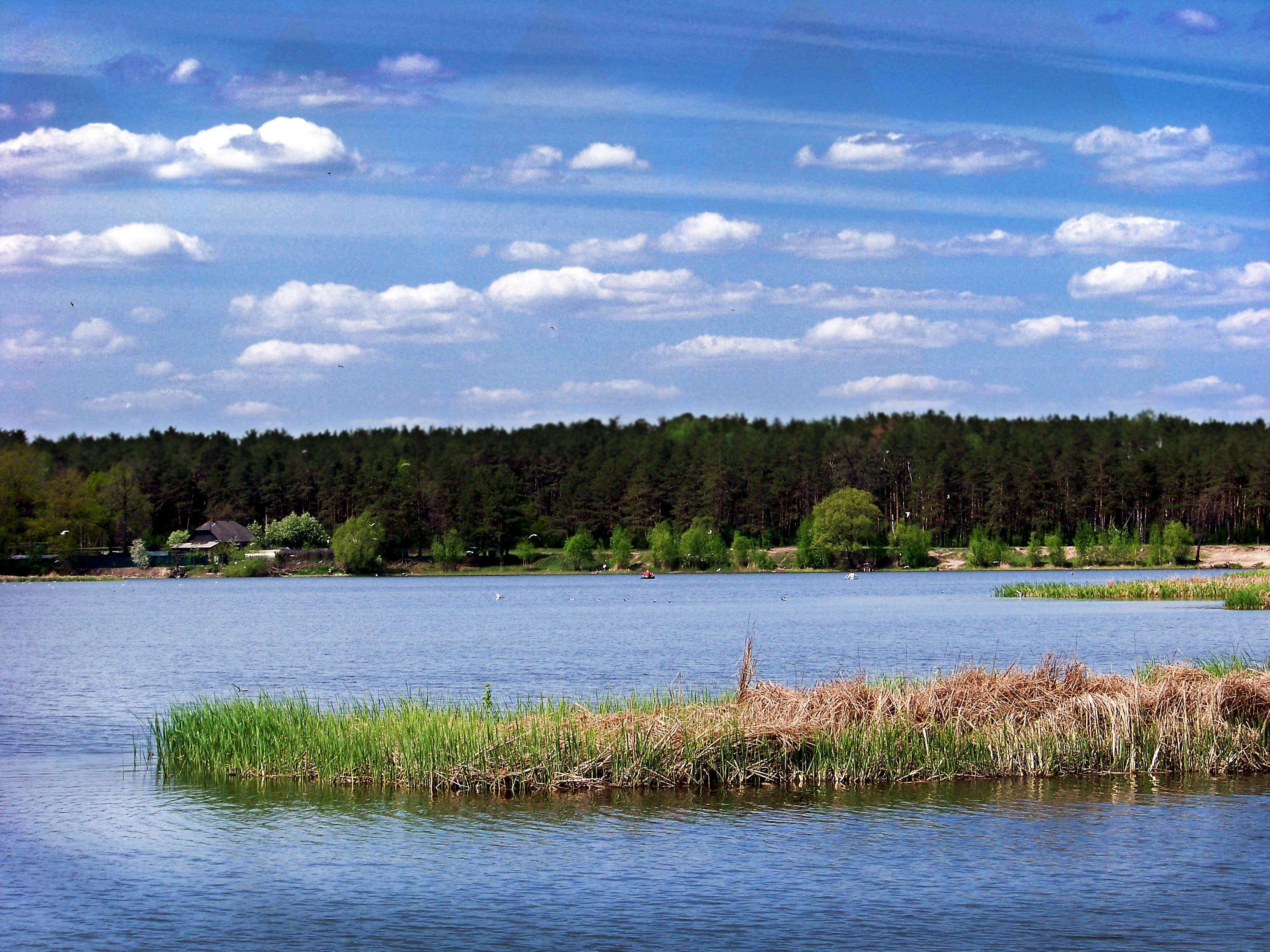 Верховья Матырского водохранилища, Грязинский район This image is related to the protected area of Russia number 4810001